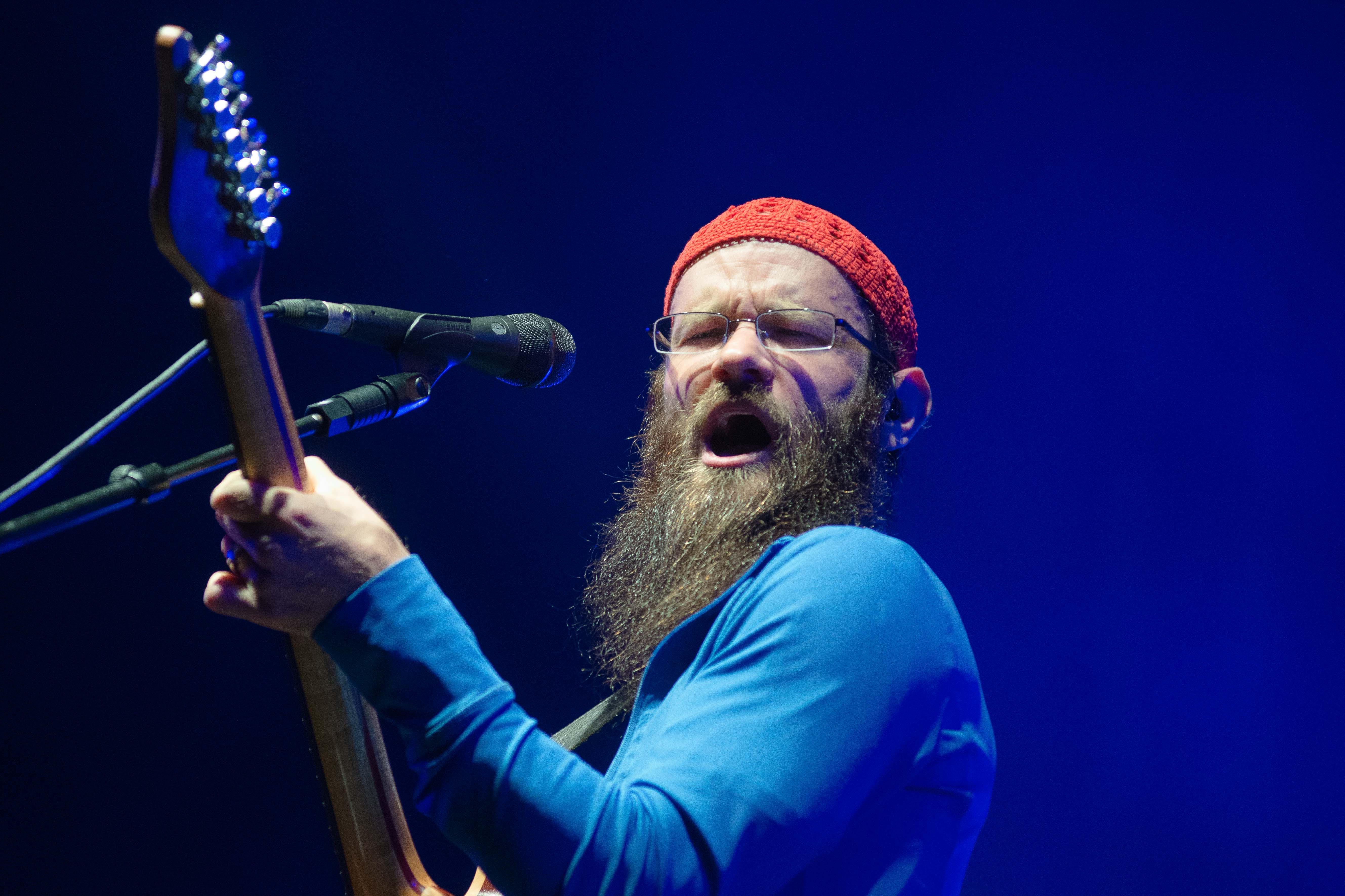 Harrison Stafford, du groupe de reggae californien Groundation, lors d'un concert au festival Les Escales à Saint-Nazaire (Loire-Atlantique) le 08 août 2015